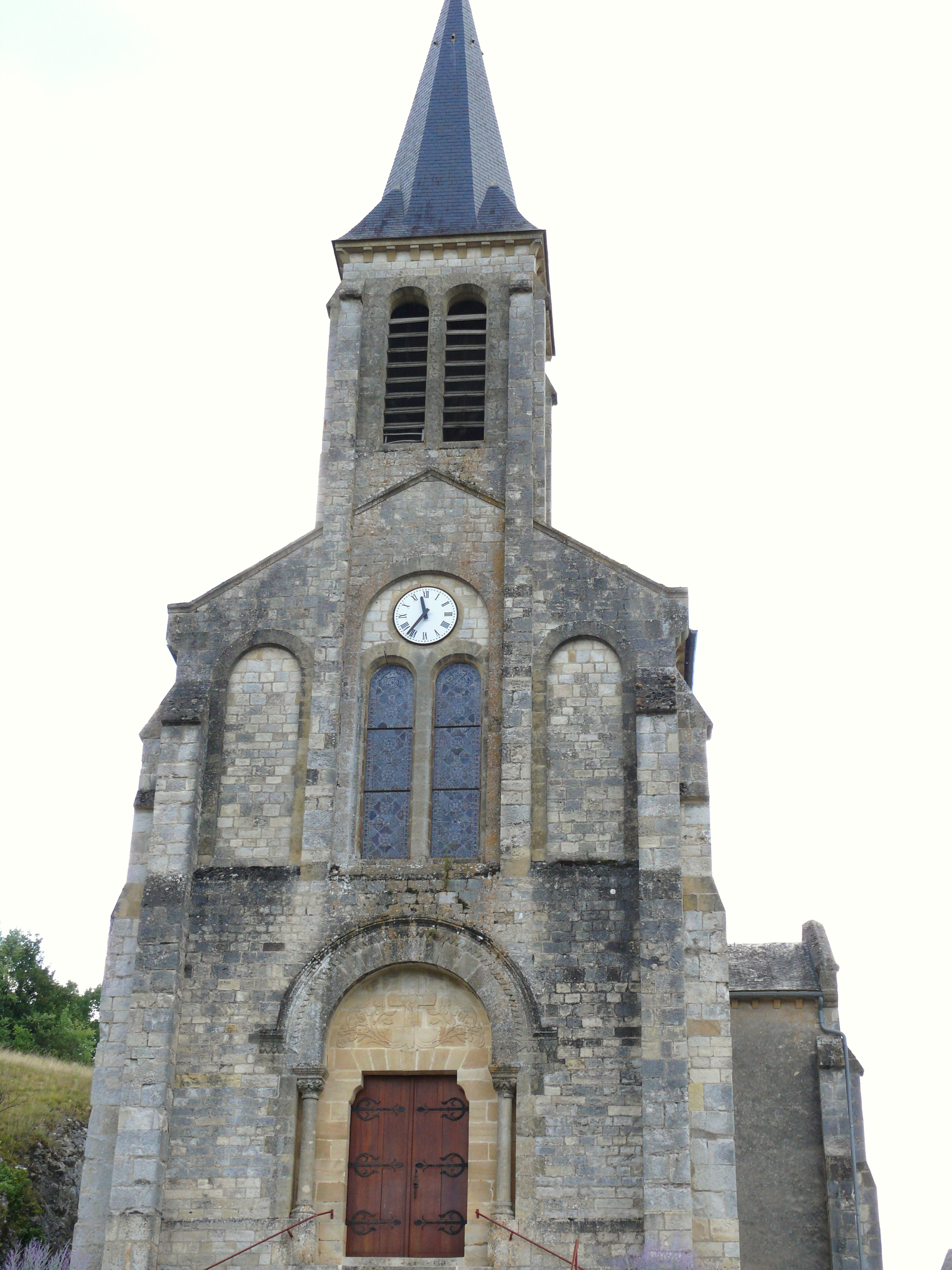 Concorès - Eglise Saint-Jean-Baptiste